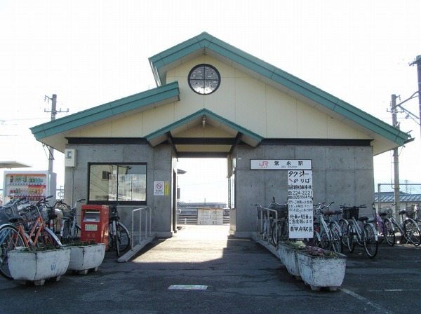 Jōei Station, Shōwa, Yamanashi, Japan